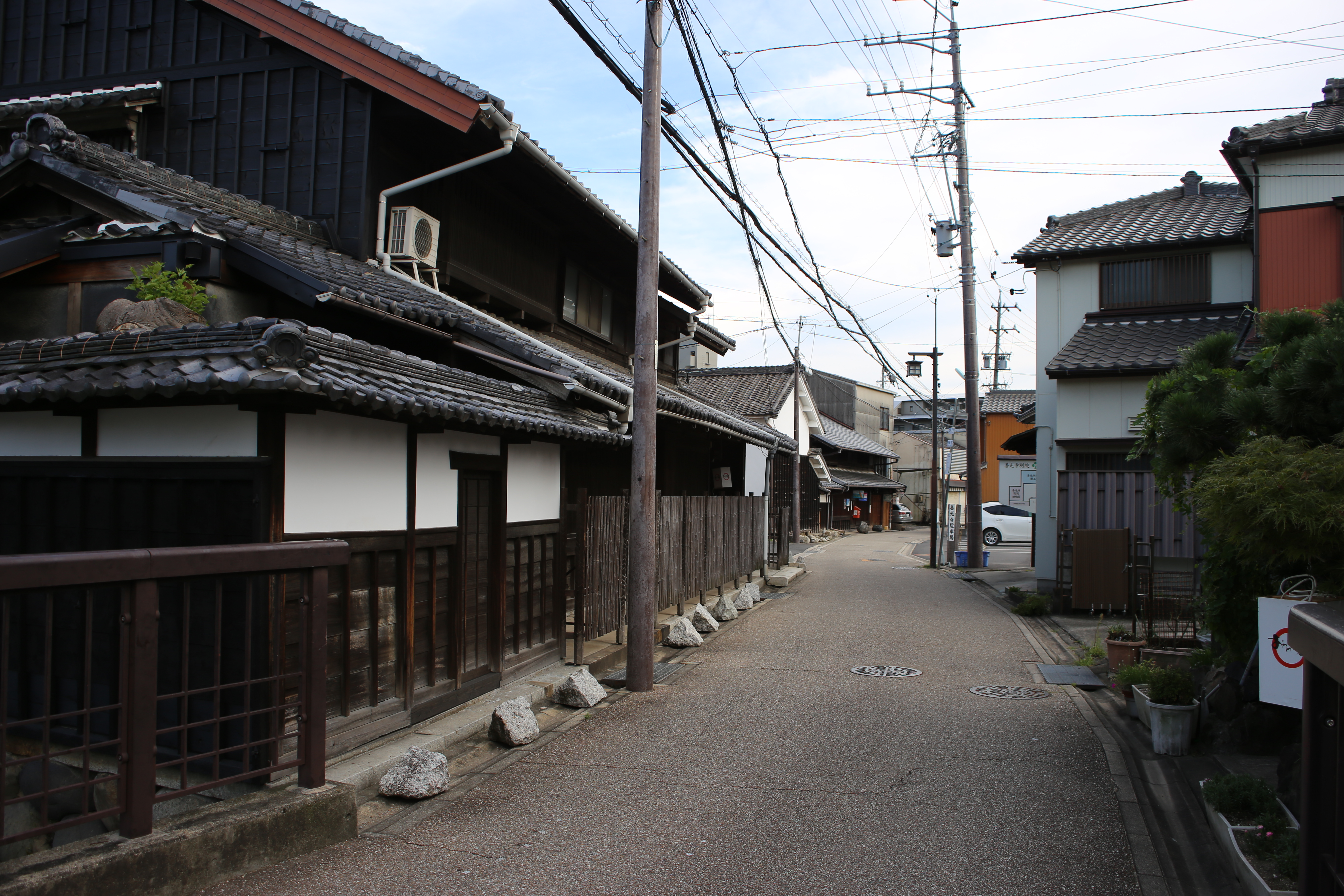 名古屋市西区中小田井の岩倉街道